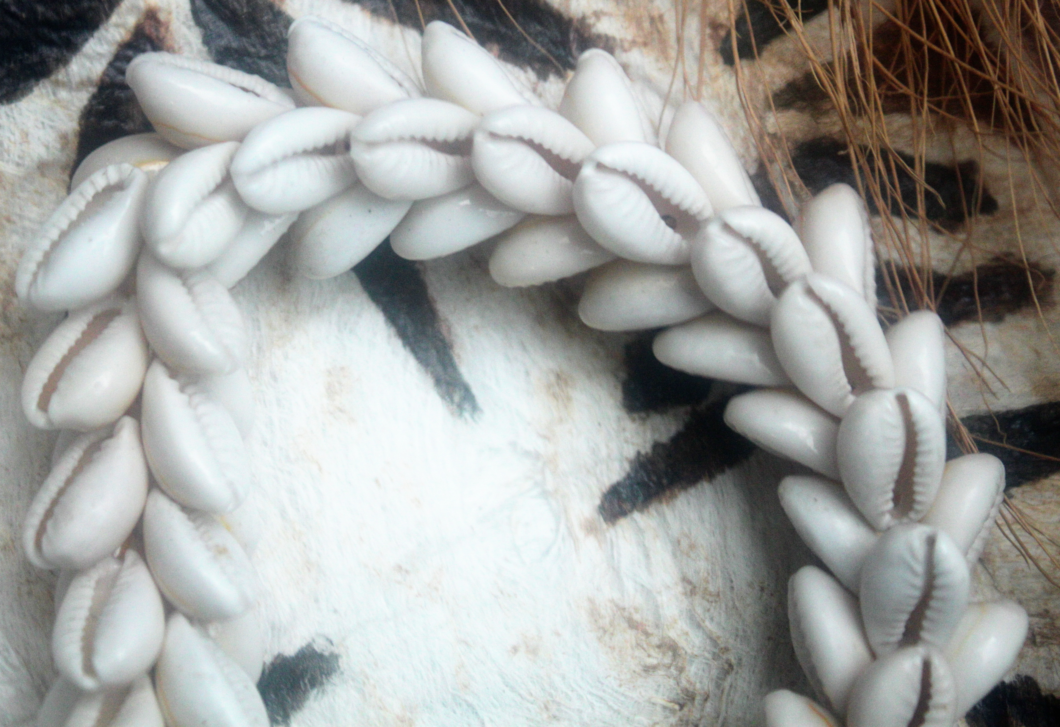 Kaurischnüre - verwendet als Kaurischmuck, früher als Kaurigeld; Souvenir aus Samoa